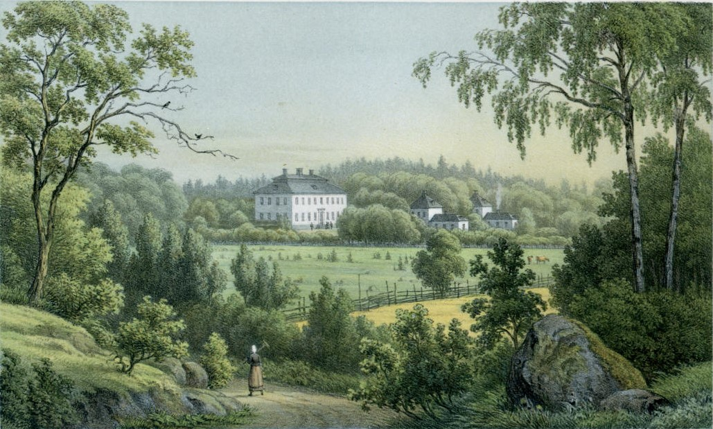 Åkeshovs slott, Bromma, väster om Stockholm. Ur verket Uplands Herregårdar med text av Carl Arvid Klingspor och Bernhard Schlegel, utgiven 1881.